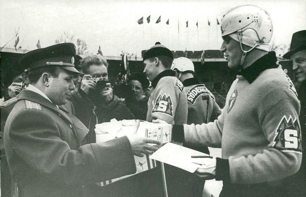 Kosmonauten Jurij Gagarin och bandyspelaren Göran "Dallas" Sedvall på Stockholms stadion 1964.